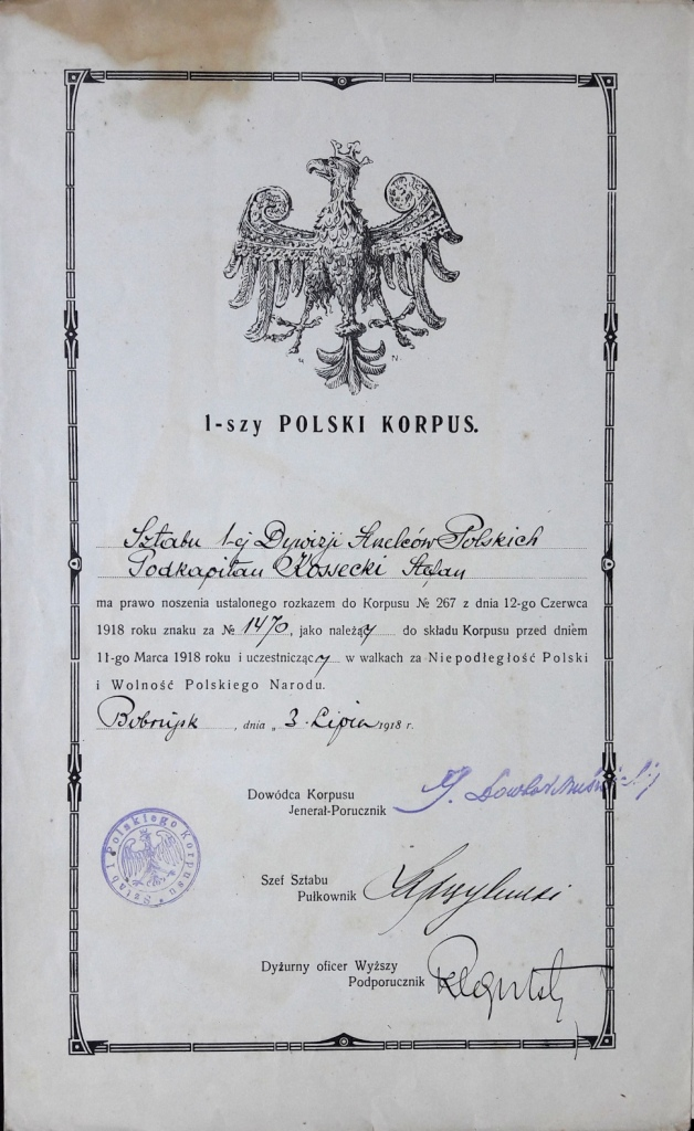 Dyplom Odznaki I Polskiego Korpusu na Wschodzie nadanej podkapitanowi Stefanowi Kosseckiemu 3 lipca 1918 r.